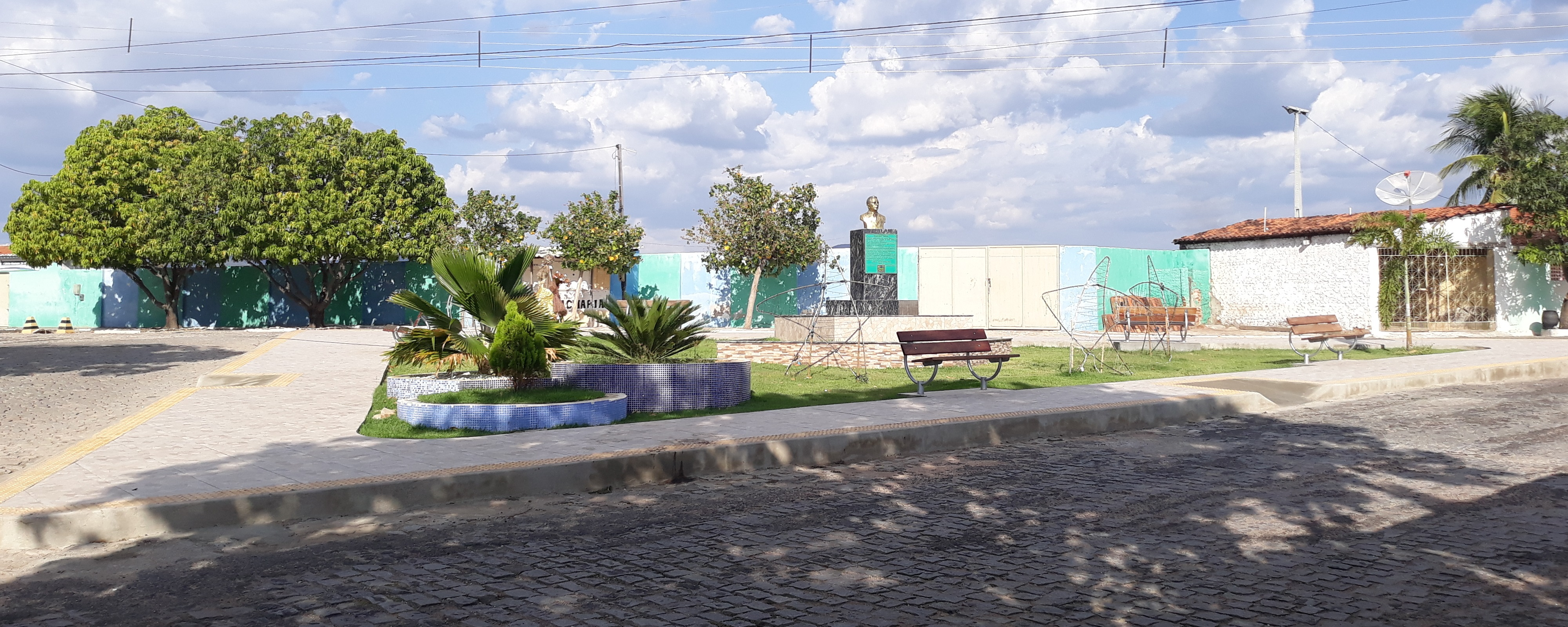 Praça na entrada da cidade de Francisco Dantas, Rio Grande do Norte, Brasil. Ao meio o busto de Francisco Dantas de Araújo, a quem o nome do município faz referência.